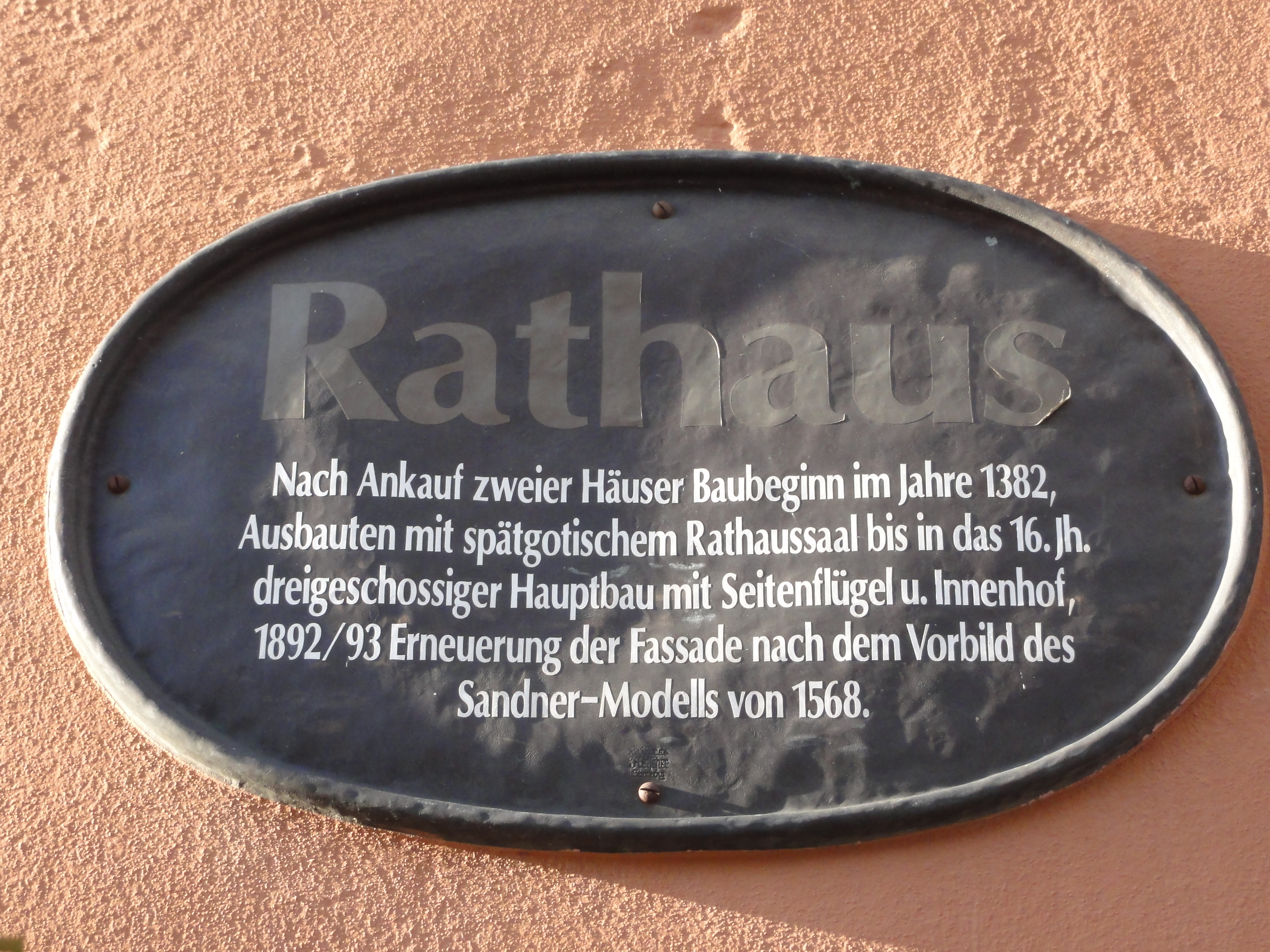 Straubing - Rathaus (Schild) Info GPS data may be inaccurate. EXIF data regarding date and time may be inaccurate.